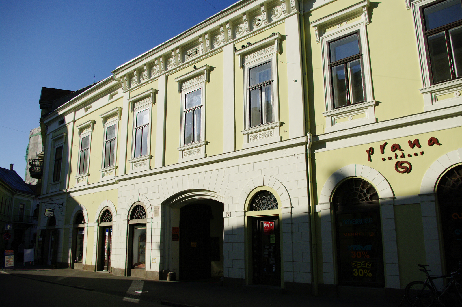 Sághy-Steinhauser-ház (Eger, Bajcsy Zsilinszky u. 17.) This is a photo of a monument in Hungary, Identifier: 5465